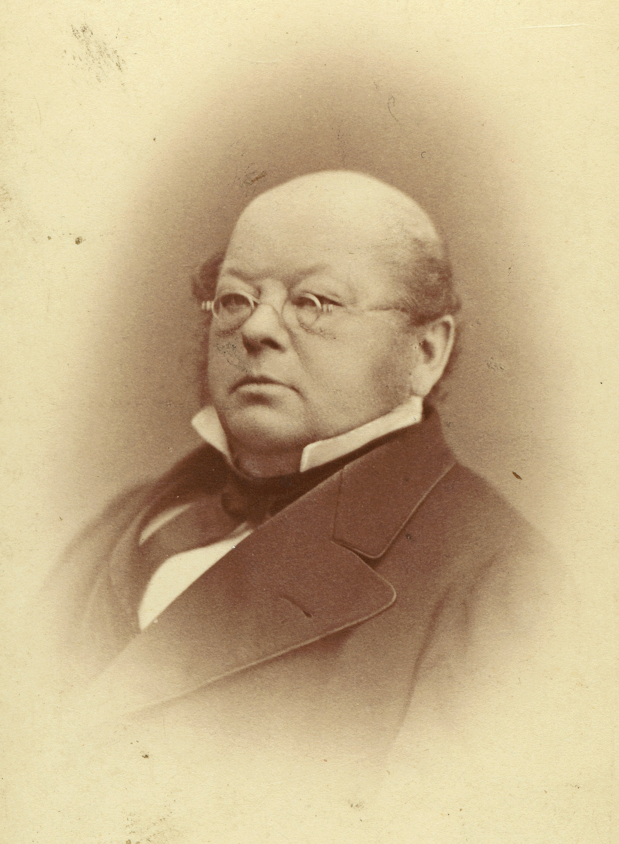 Schulratspräsident 1857-1888